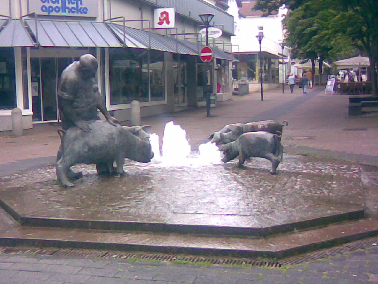 Sültemeyer-Brunnen in Bad Oeynhausen